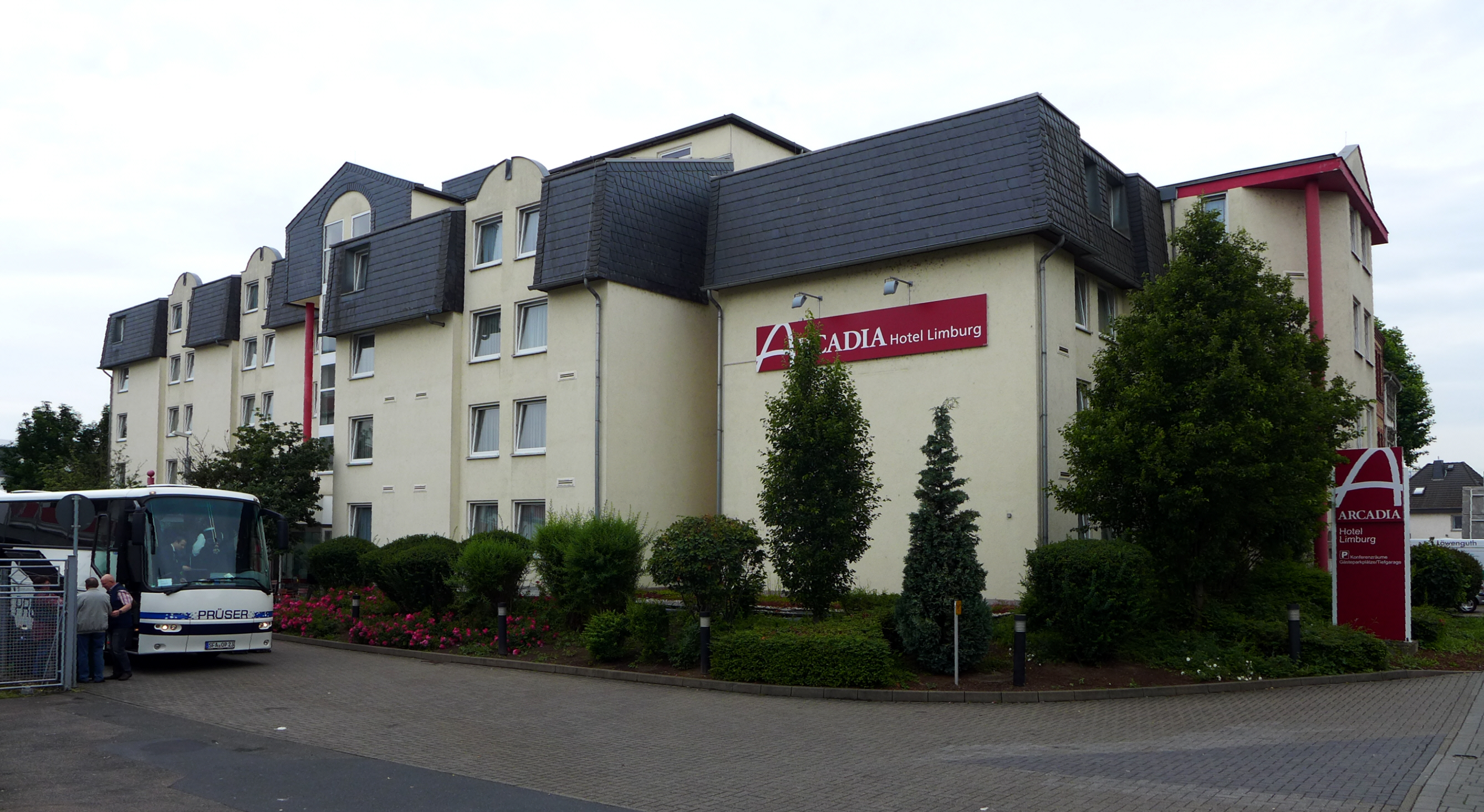 Tagungshotel Arcadia in Limburg a. d. Lahn, Hessen, DE.